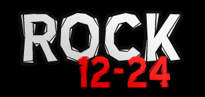 Festivalen Rock 12-24 Logo